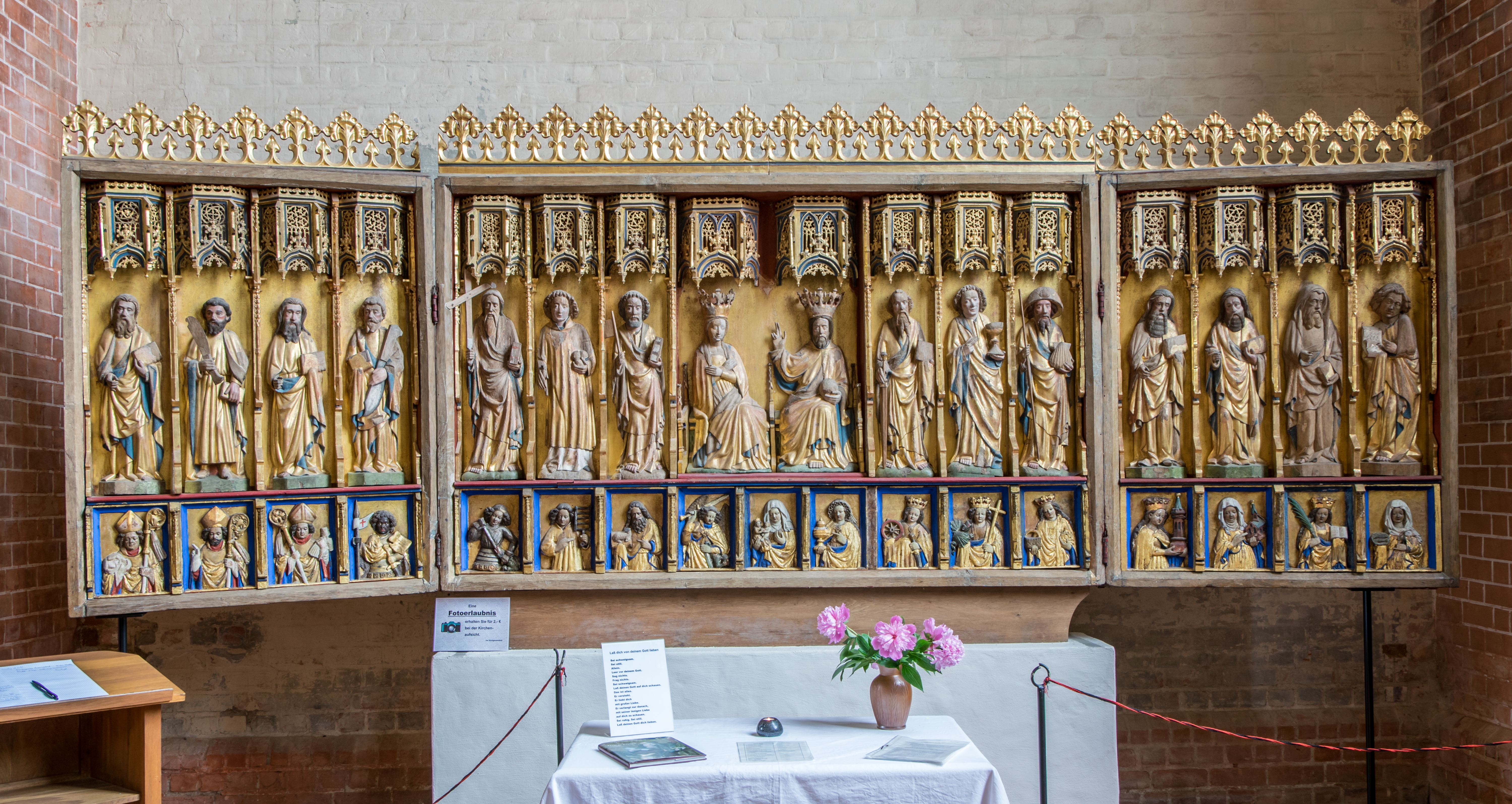 Teterow St. Peter und Paul Marienkrönungsaltar